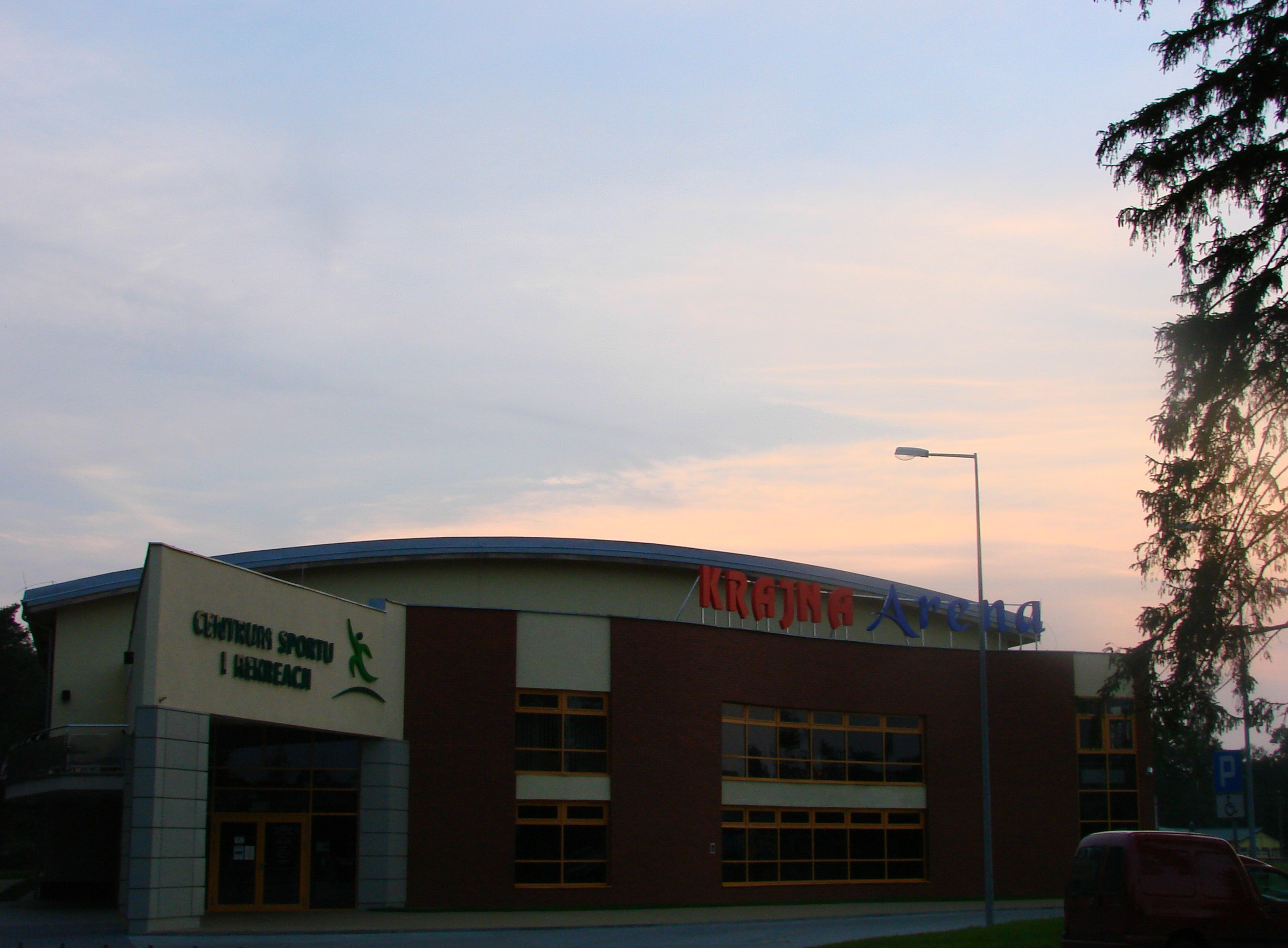 Centrum Sportu i Rekreacji; Hala Widowiskowo-Sportowa "Krajna Arena", przy ul. Chojnickiej. Obiect in Sępólno Krajeńskie, Poland.